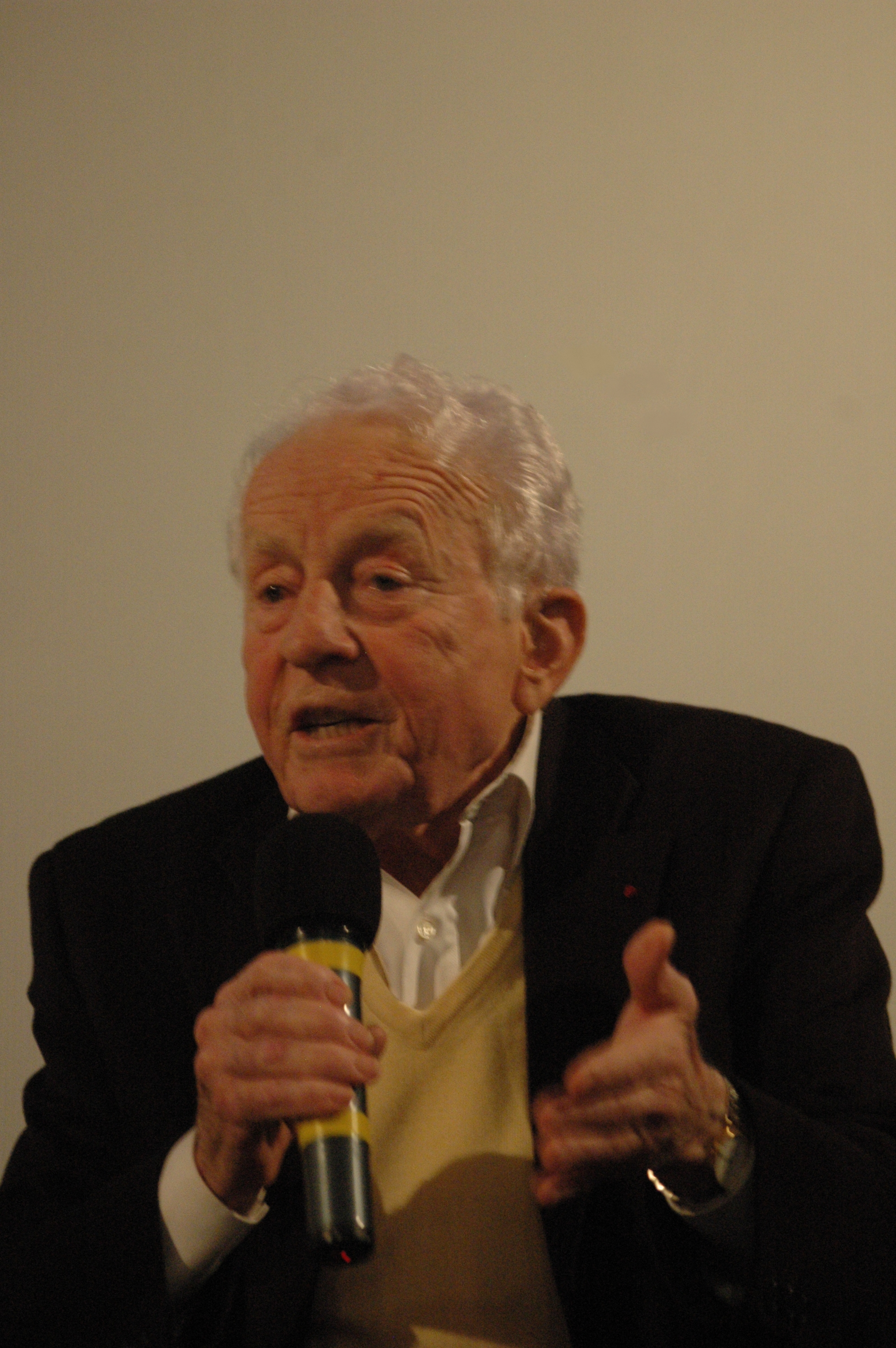 Léon Landini, résistant français, présent dans le film Les Jours Heureux, lors d'un débat au festival de Mouans-Sartoux en octobre 2013